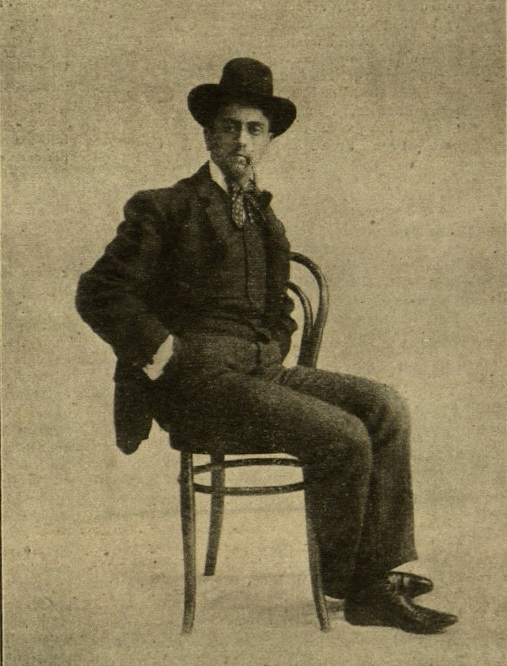 Lluís Plandiura i Pou, a la revista Catalunya artística 1a època, núm. 135 (15 gen. 1903)